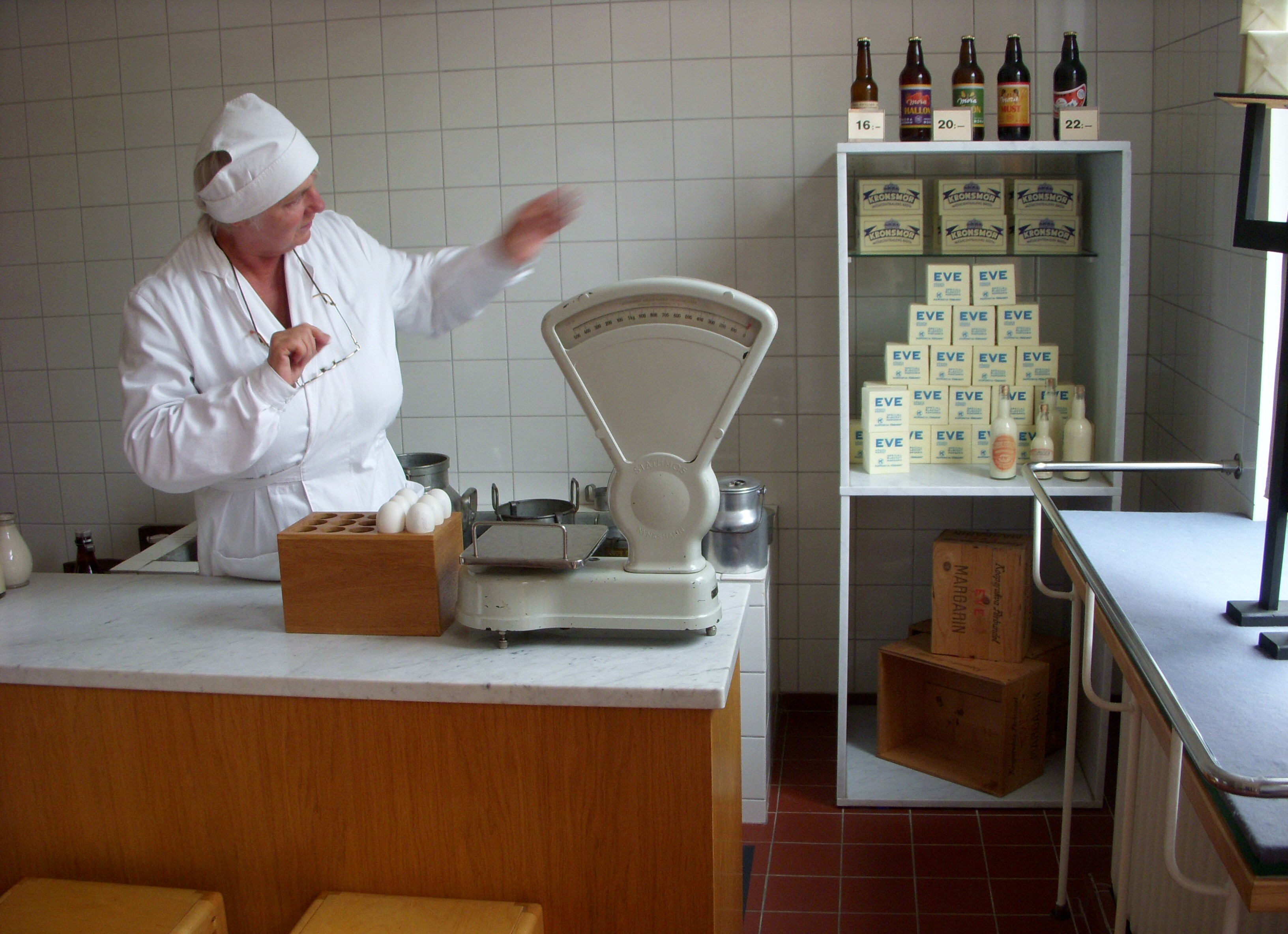 Konsum-butiken på Skansen, Stockholm (interiör)